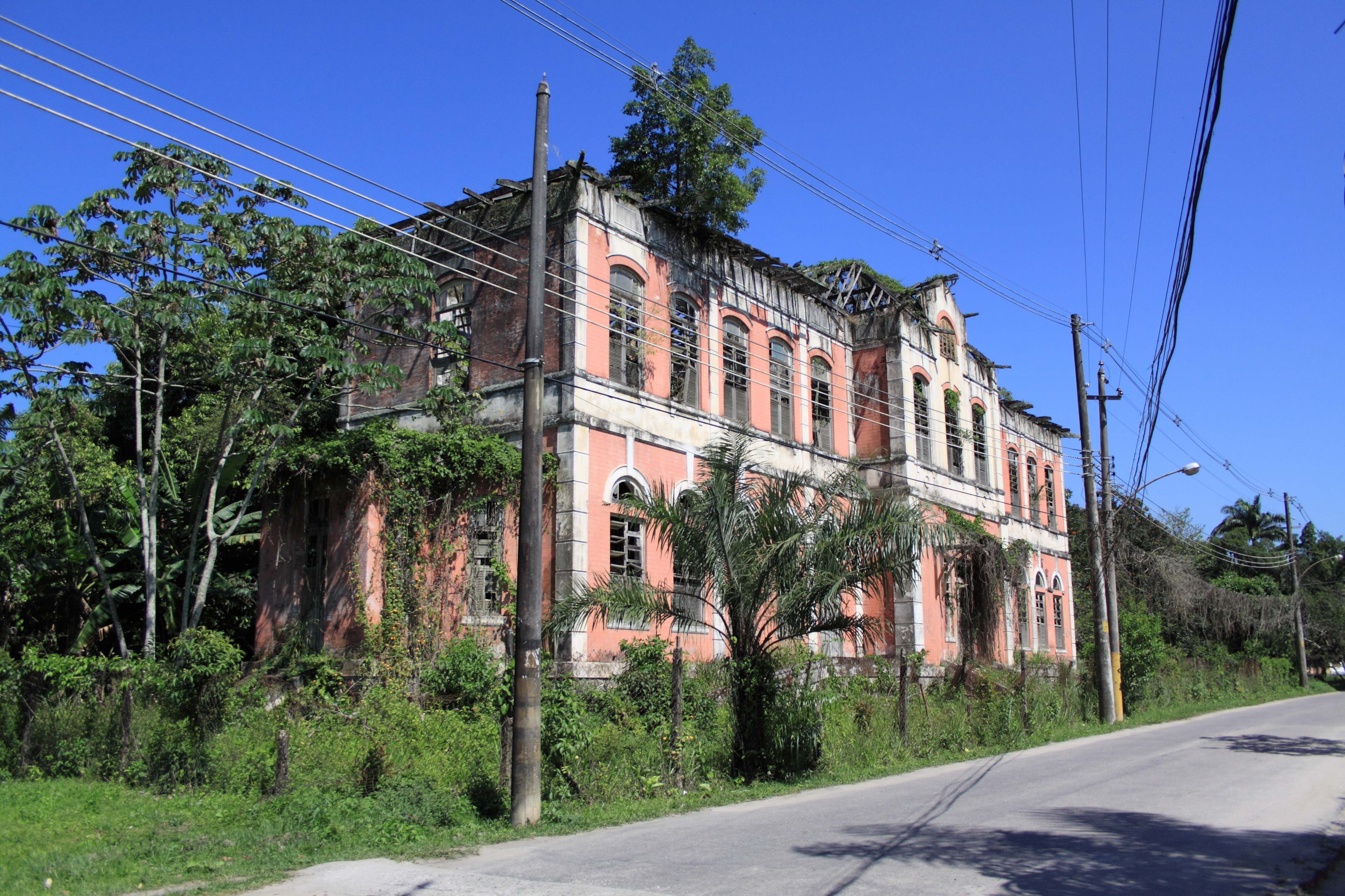 Núcleo Histórico Rodrigues Caldas da Colônia Juliano Moreira